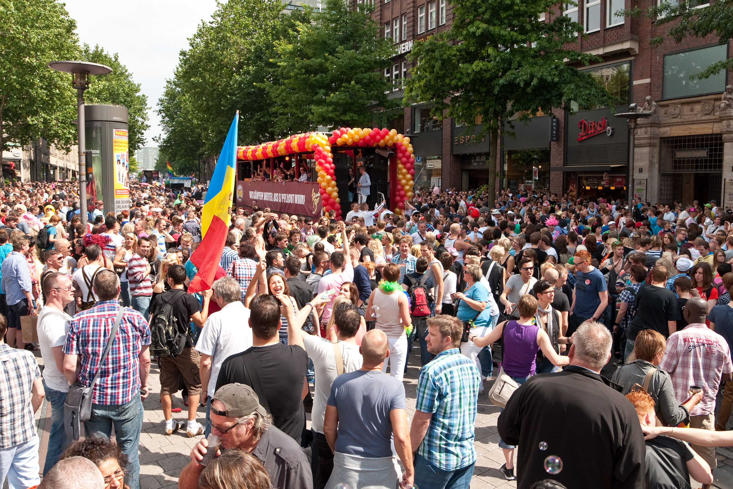 Christopher Street Day in Hamburg 2012